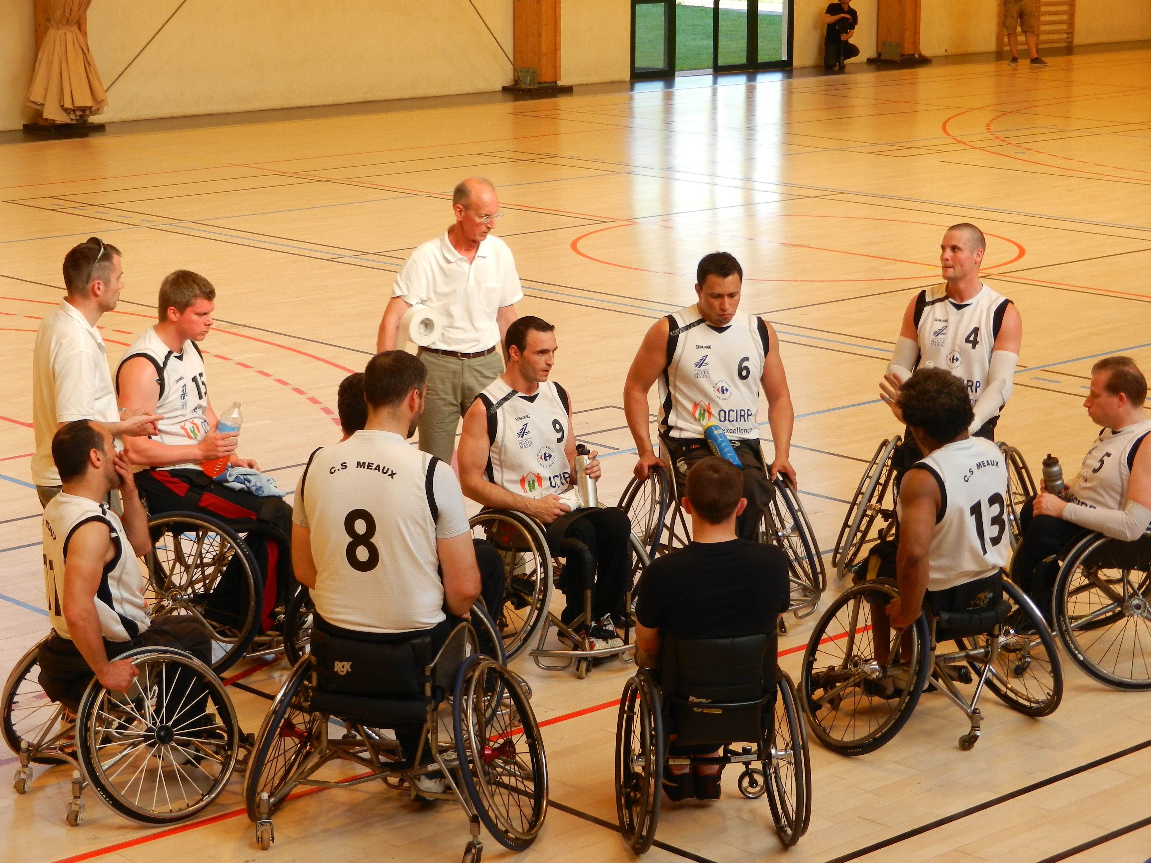 Finale retour du championnat de France handibasket 2011-2012, Meaux contre Hyères (temps mort de Meaux) ; rencontre délocalisée à Coulommiers (77)